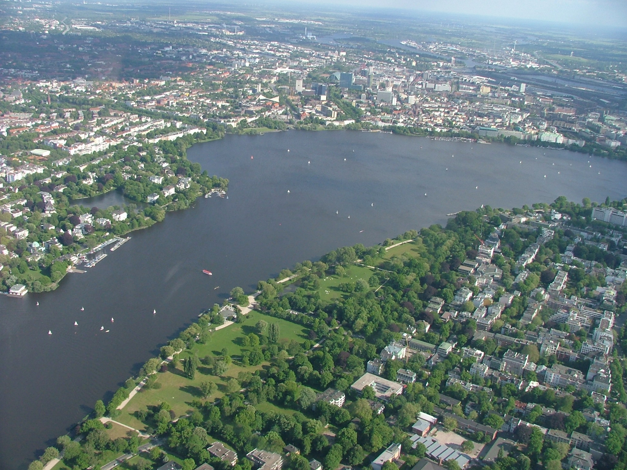 Blick über die Außenalster von der Eimsbütteler Seite aus gesehen. Am gegenüberliegenden Ufer liegt die Uhlenhorst und rechts oben St. Georg.